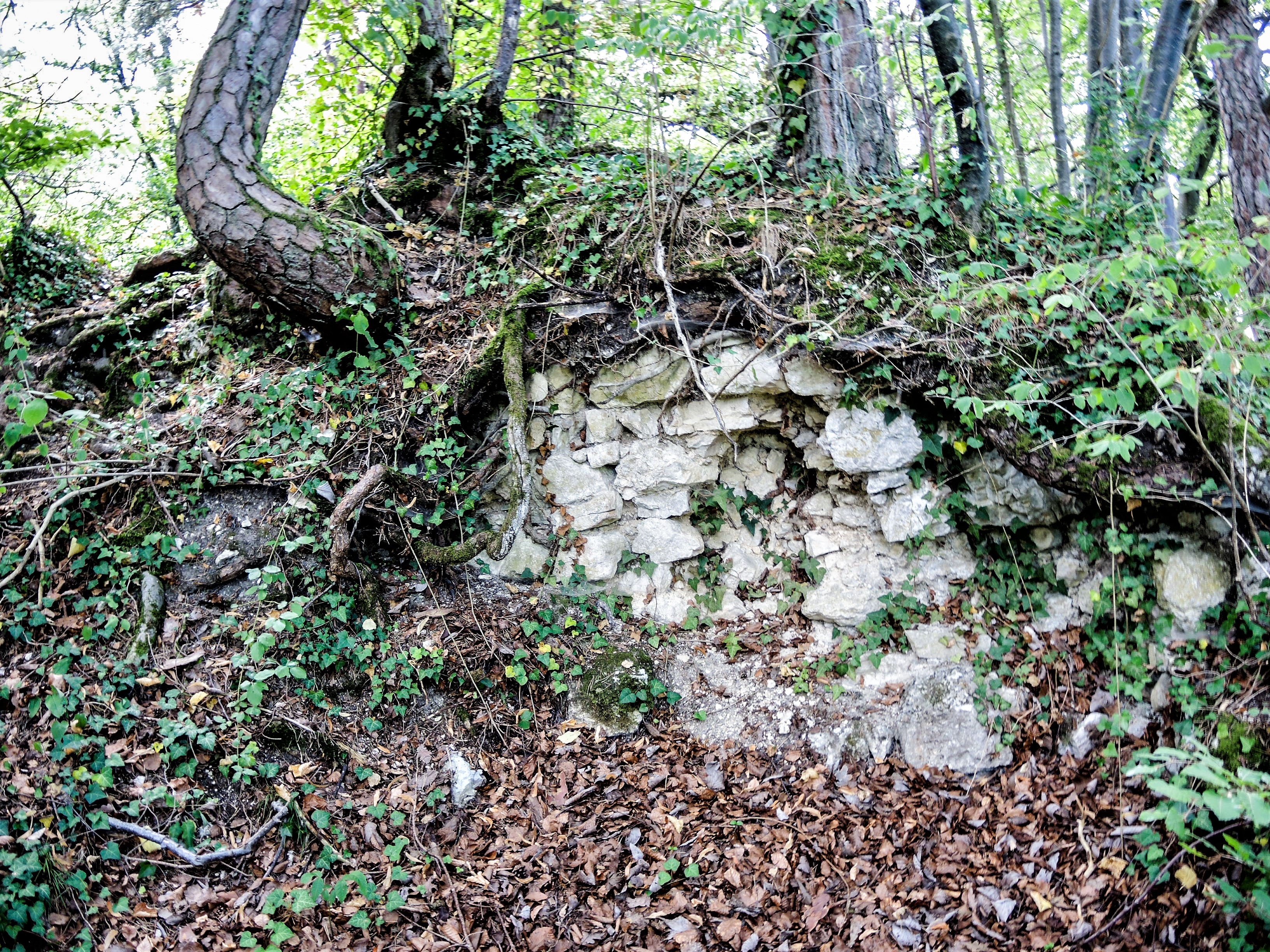 Reste de la muraille de la (tour sud ?)